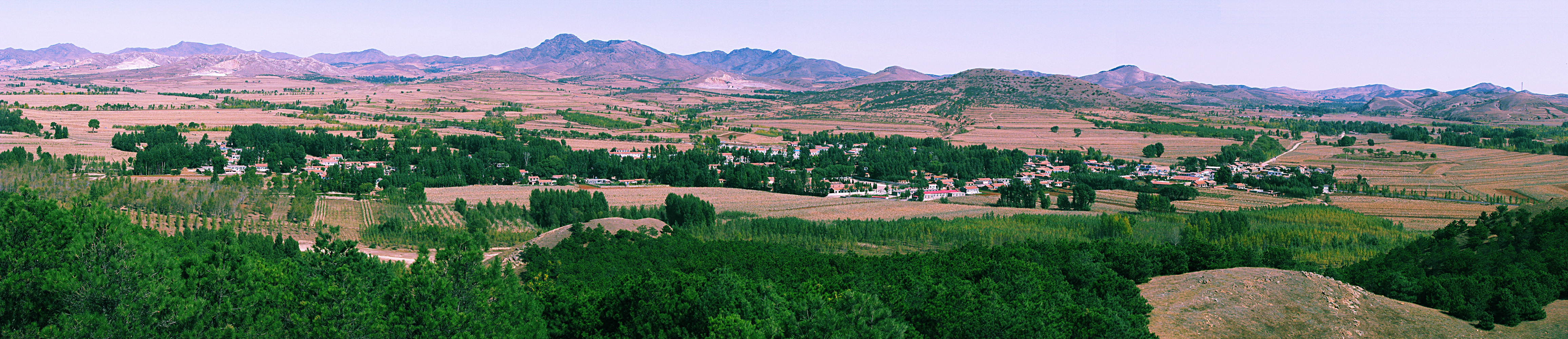 南山俯瞰八户村